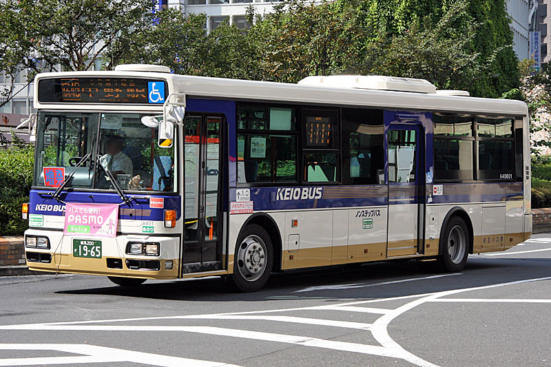 Keio Bus Higashi 京王バス東